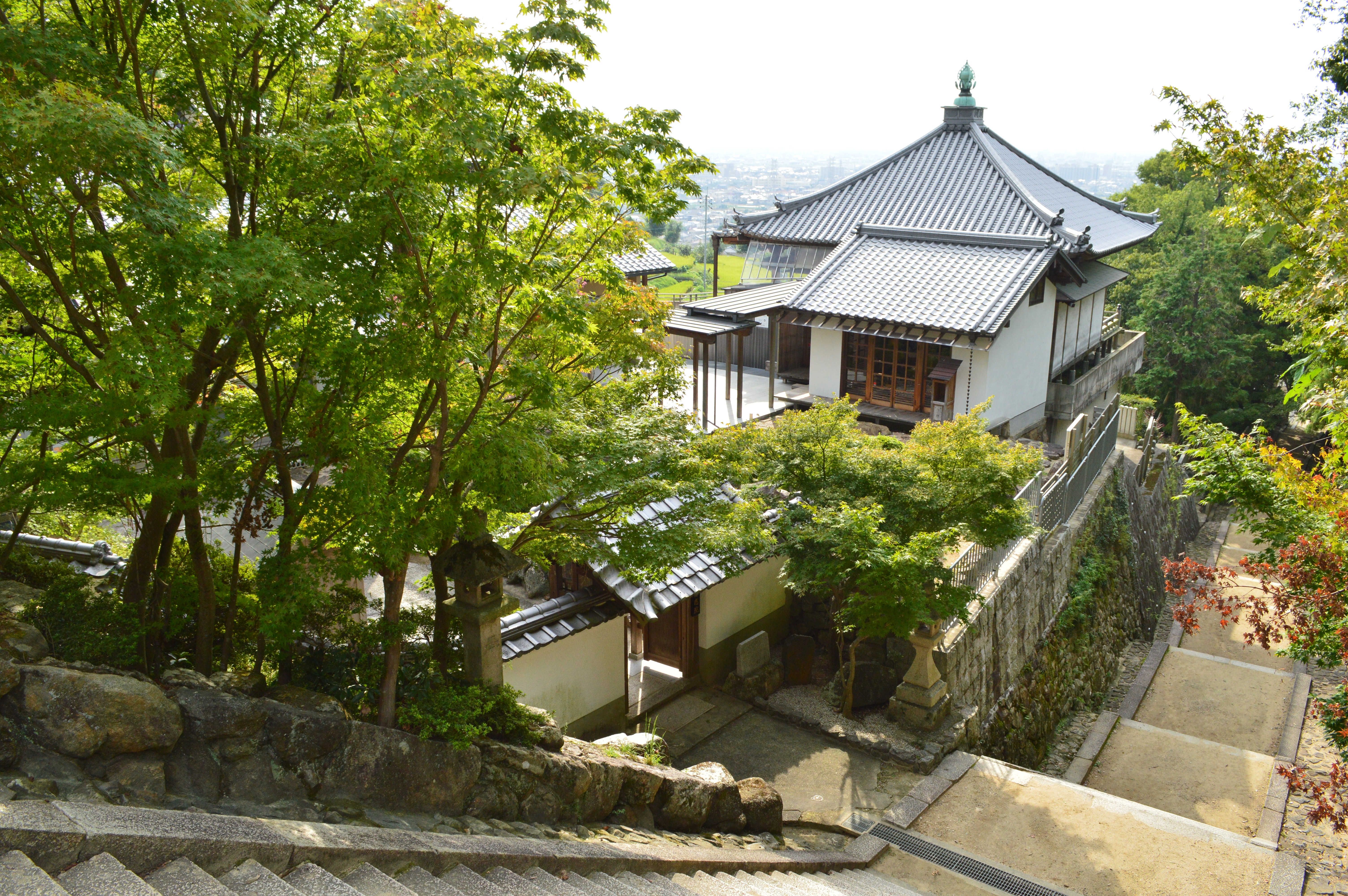 恩智神社参道と天川山神宮寺感応院